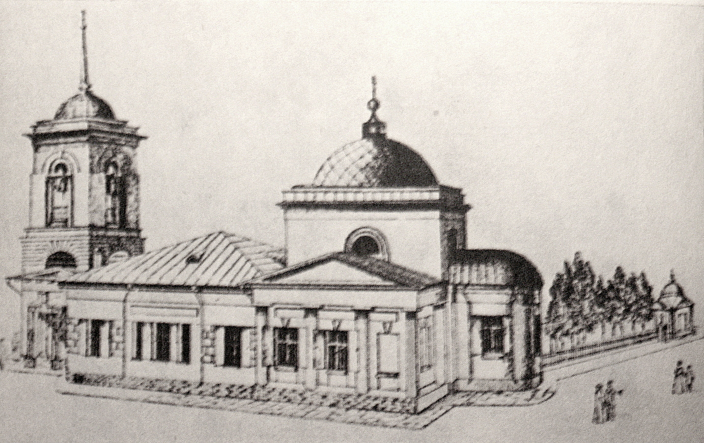 Часовня преподобного Сергия при церкви Троицы в Полях в Китай-городе в Москве. Снесена в 1934 году.